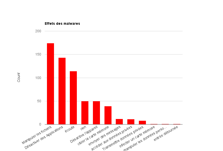 Schéma des effets de malwares sur les smartphone